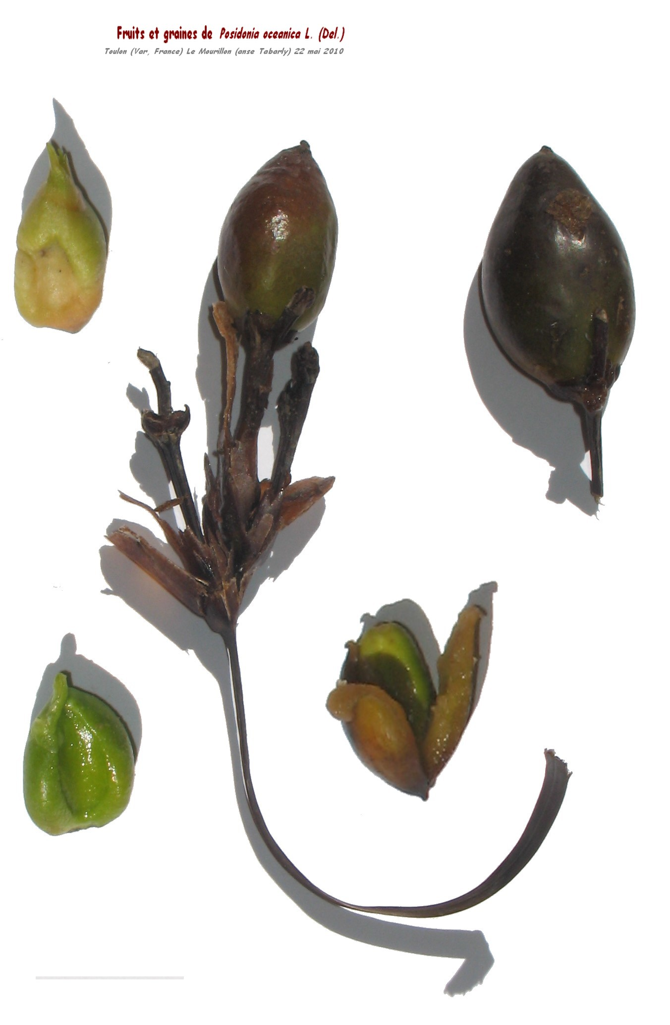 Fruits et graines de Posidonia oceanica (L.)Del.. Un fruit est porté par une inflorescence. Échoués sur le rivage de Toulon (Var, France),4e anse du Mourillon dite « anse Tabarly »